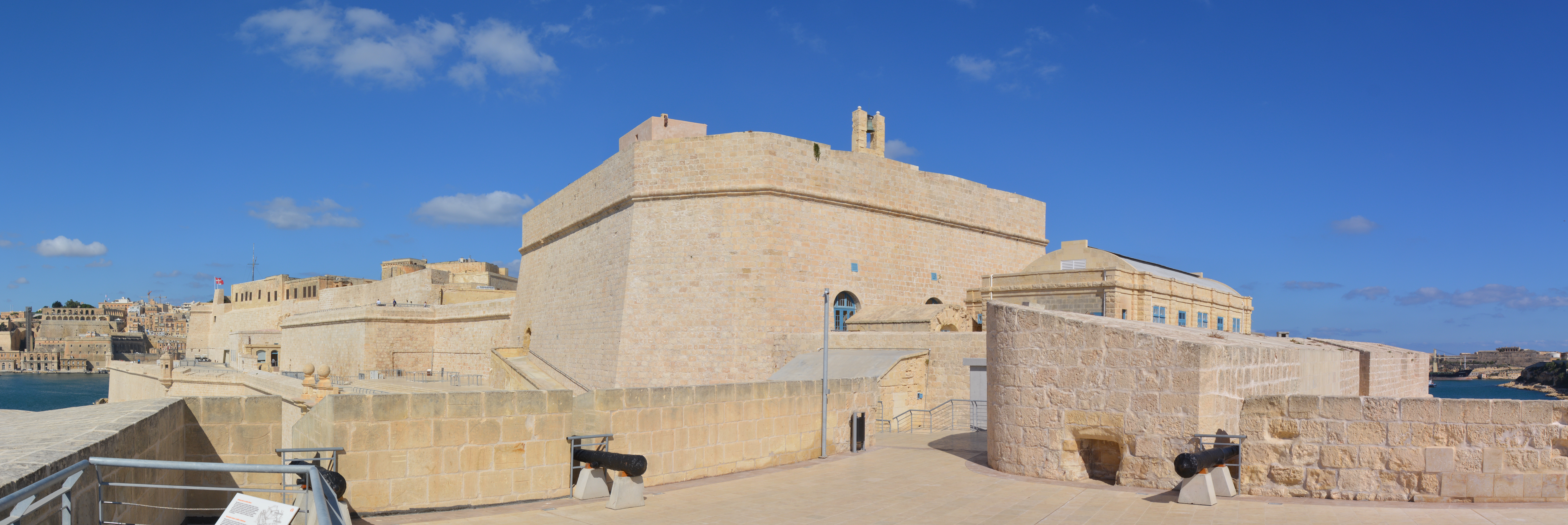 Vue intérieure du Fort Saint Ange, Birgu, Malte